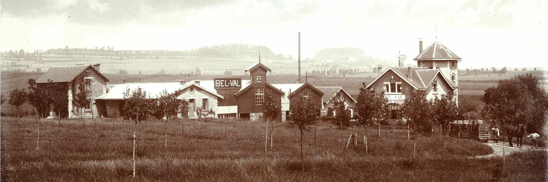 D'Mineralwaasserquell Bel-Val ufangs vum 20. Joerhonnert.